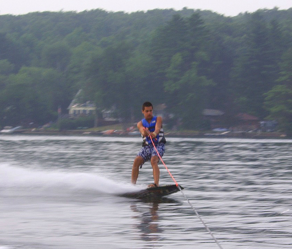 Wasserski. In diesem Fall auf einem See in Rhode Island/USA.